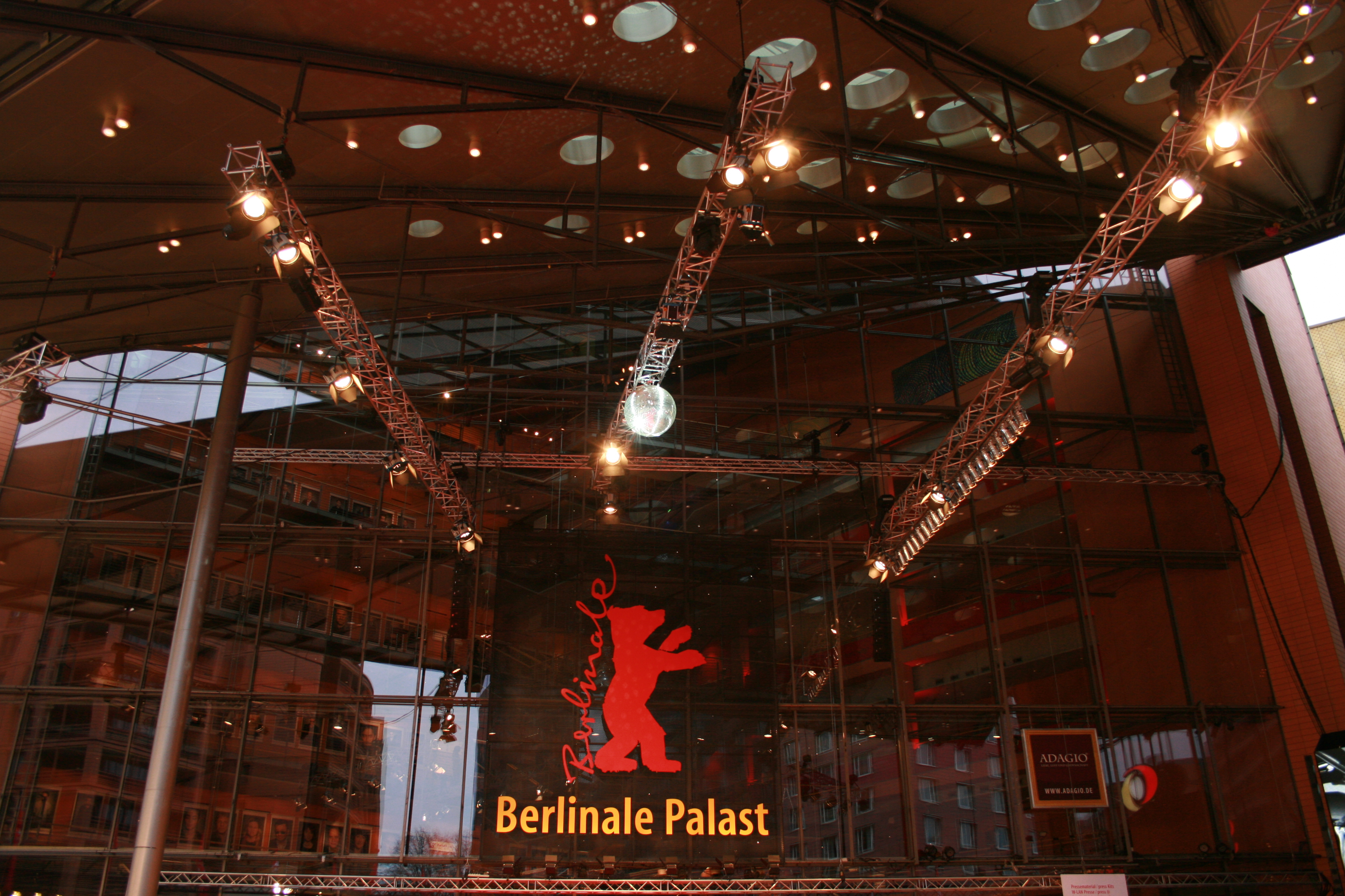 Berlinale 2013 . 63. Internationale Berliner Filmfestspiele - Photo: Alireza Rezvani Pictures . Web . Multimedia